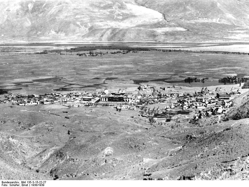 Tsetang, Ortschaft mit Kloster